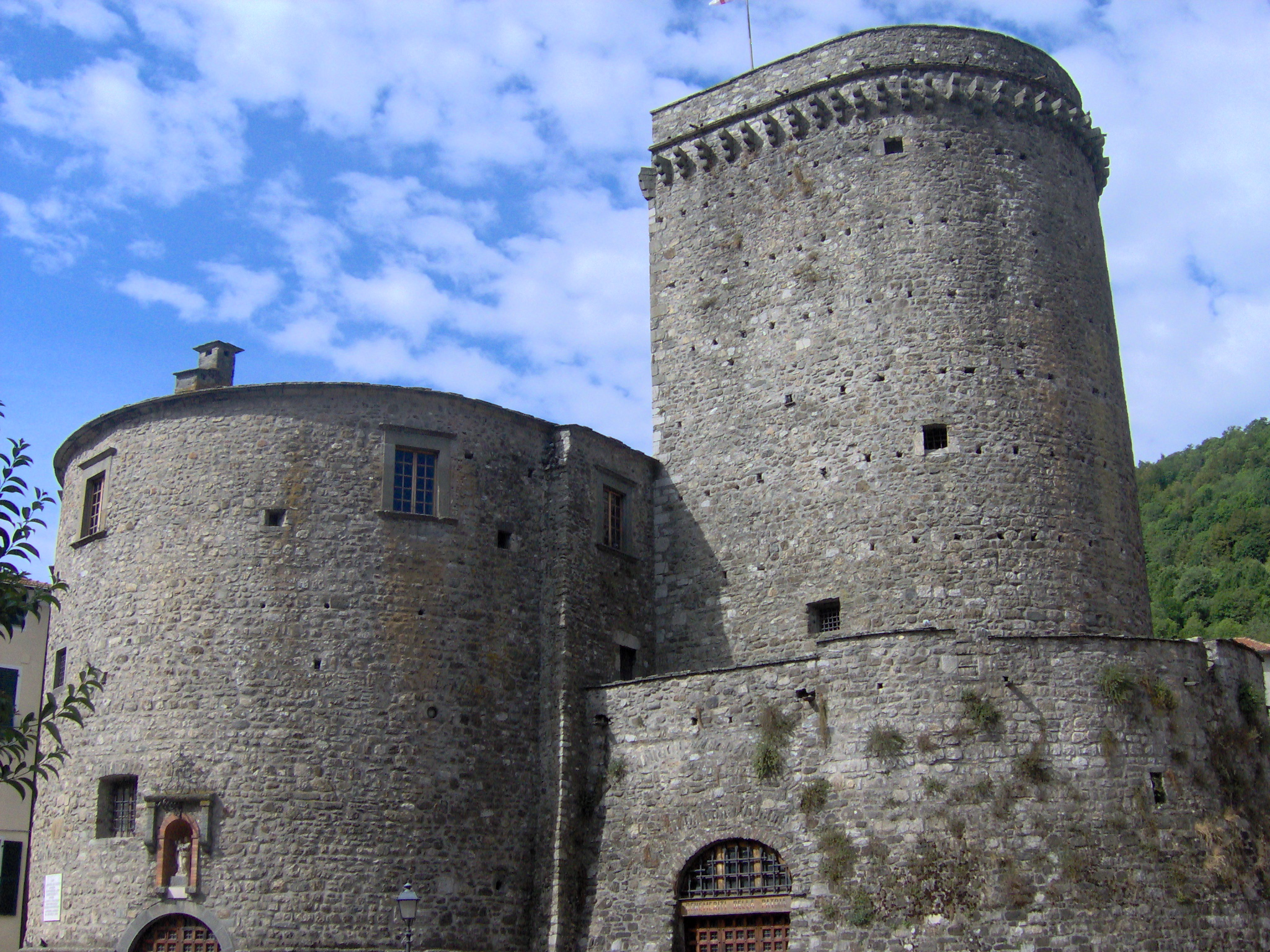 Varese Ligure - Bastione nel centro del paese